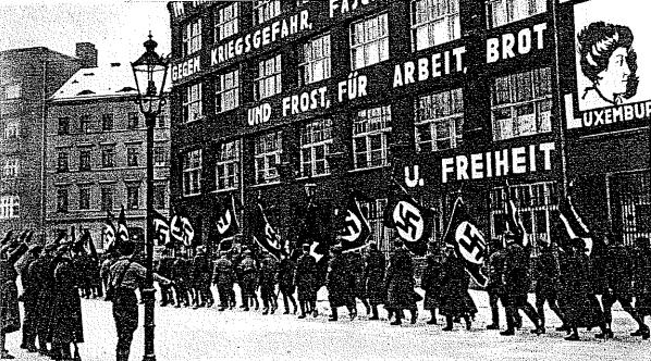 Die SA. demonstriert am 22.Januar 1933 vor dem Karl-Liebknecht-Haus auf dem Bulowplatz in Berlin.